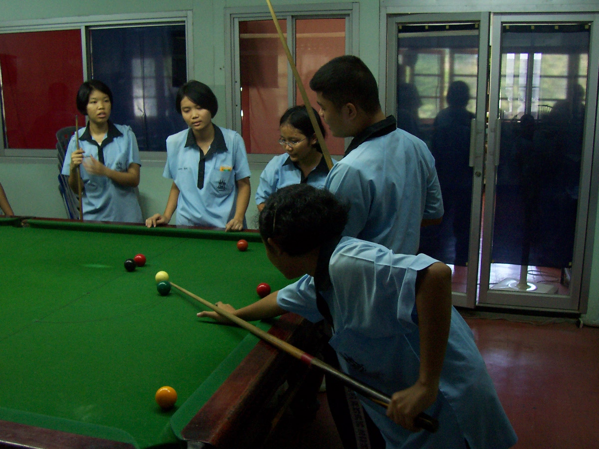 girl students playing snooker